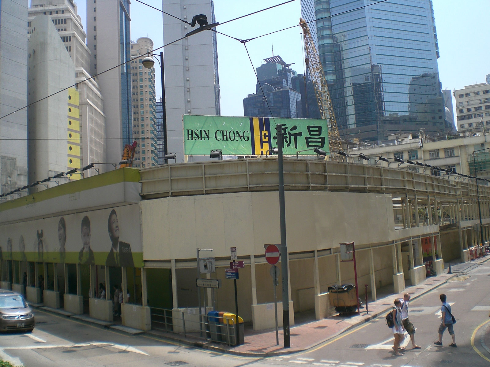 新昌營造, 銅鑼灣zh:興利中心在zh:軒尼詩道與zh:利園山道交界